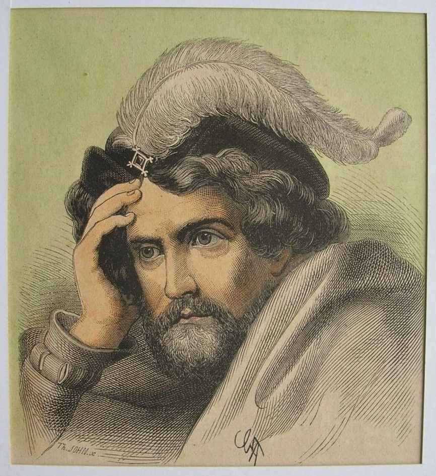 Ludwig Devrient als Faust 1873, Holzstich nach F. Th. Hildebrandt, 13 x 12 cm